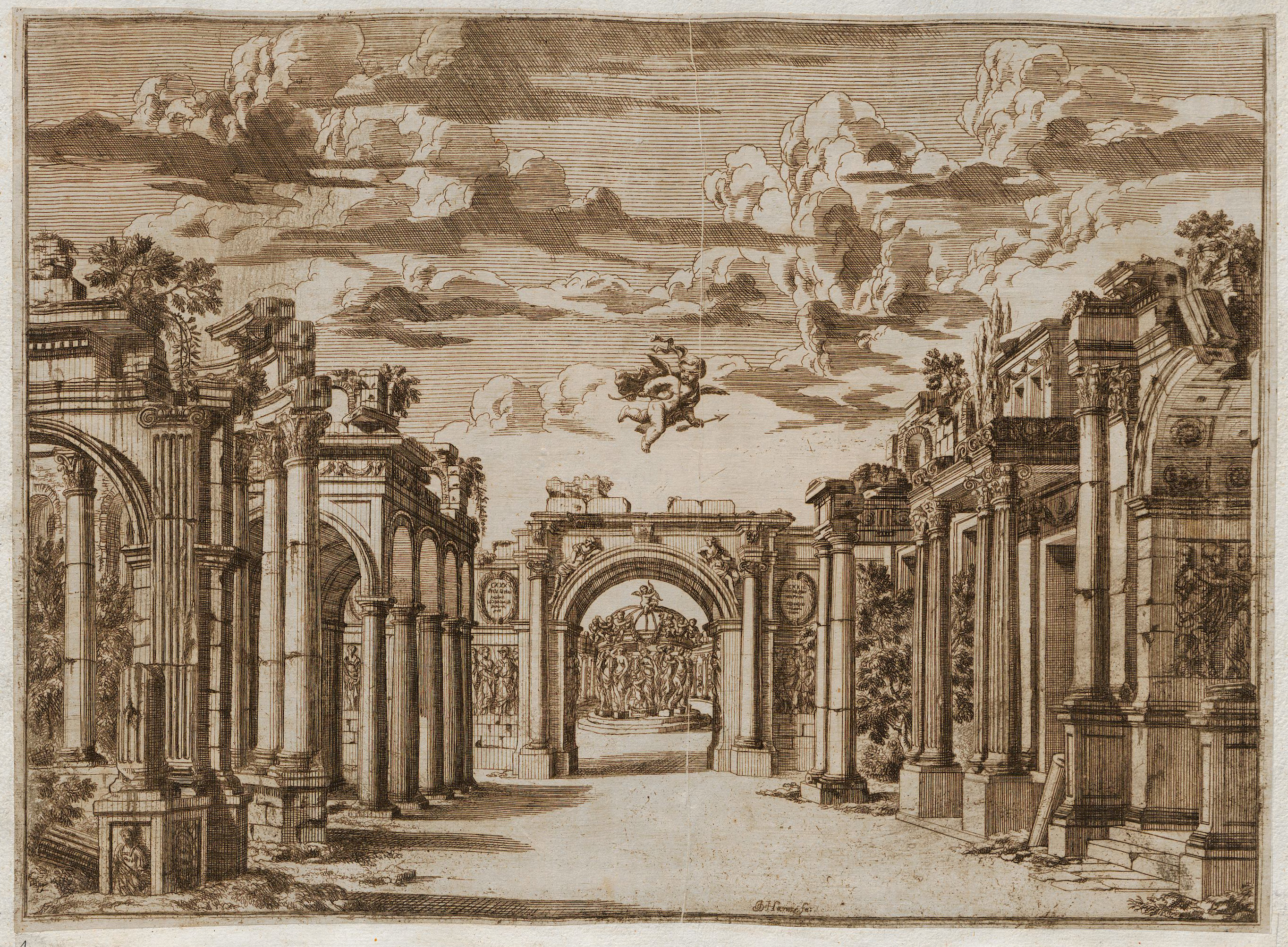 Grafik aus dem Klebeband Nr. 15 der Fürstlich Waldeckschen Hofbibliothek Arolsen "Ballet von Zusammenkunft und Wirkung der VII Planeten" , aufgeführt am 3. Februar 1678 im Komödienhaus Dresden, anlässlich der „Durchlauchtigsten Zusammenkunft“ Prolog (Ruinen mit Venustempel, Cupido kommt aus den Wolken geflogen)